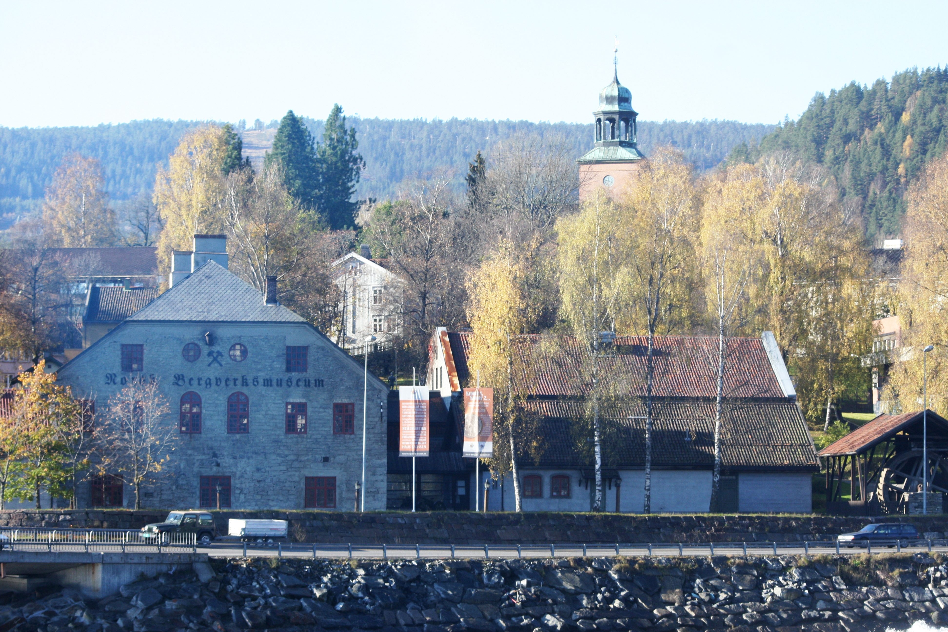 Kongsberg Mint and silver works, Buskerud, Norway